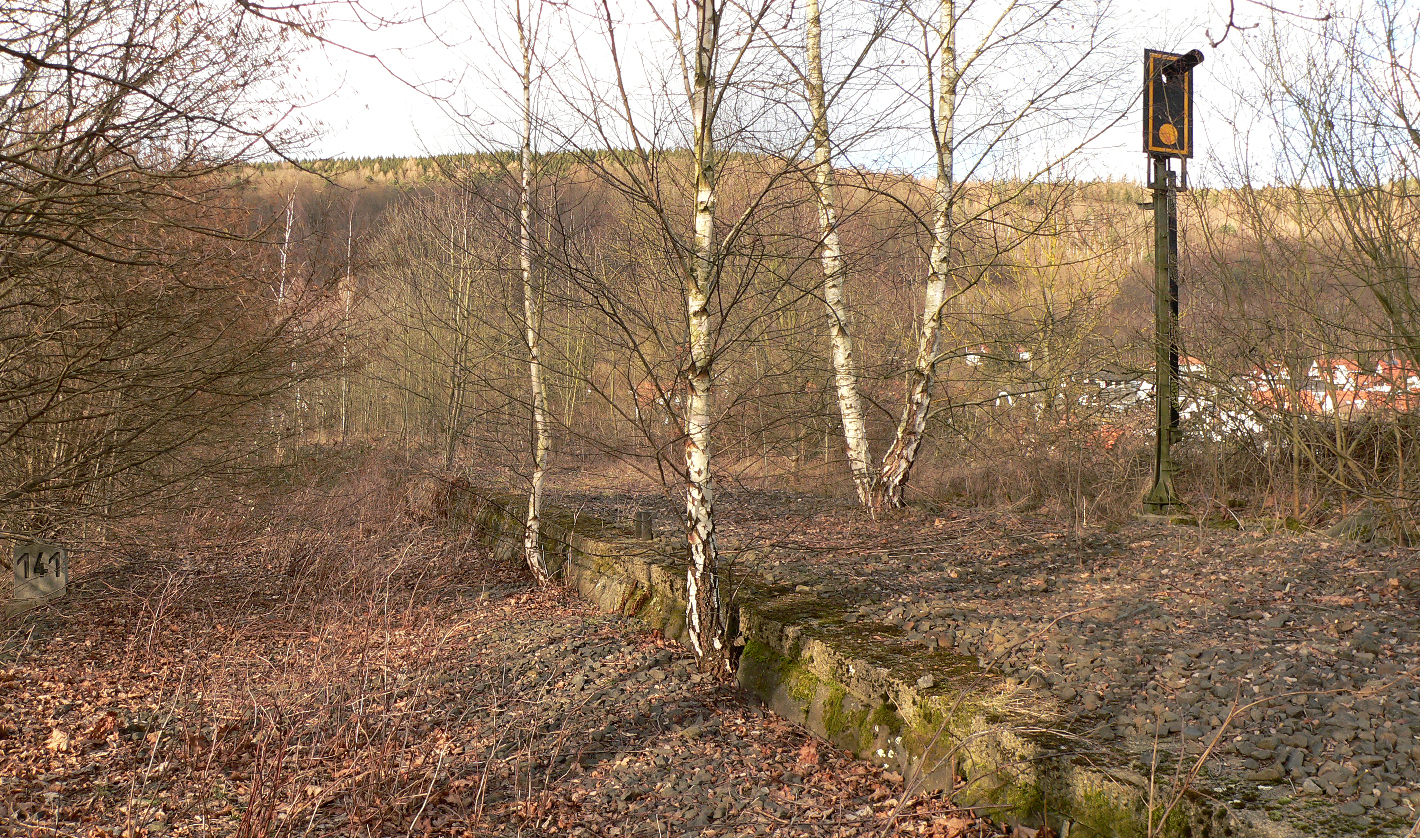 Dransfelder Rampe am Abzweig der Hafenbahn in Hann. Münden